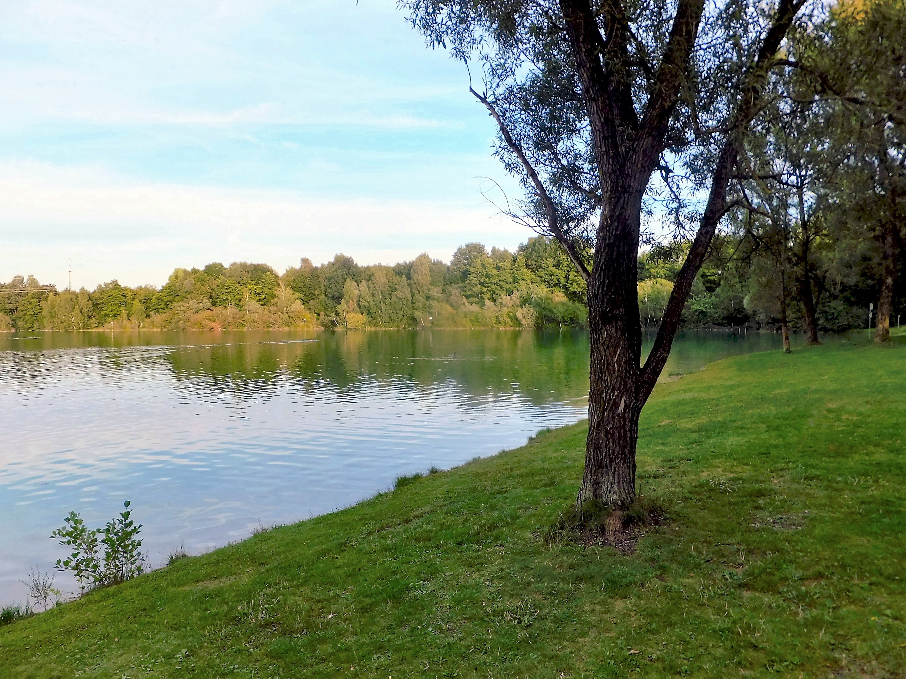 Unterschleißheimer See 27.8.2015 - 6